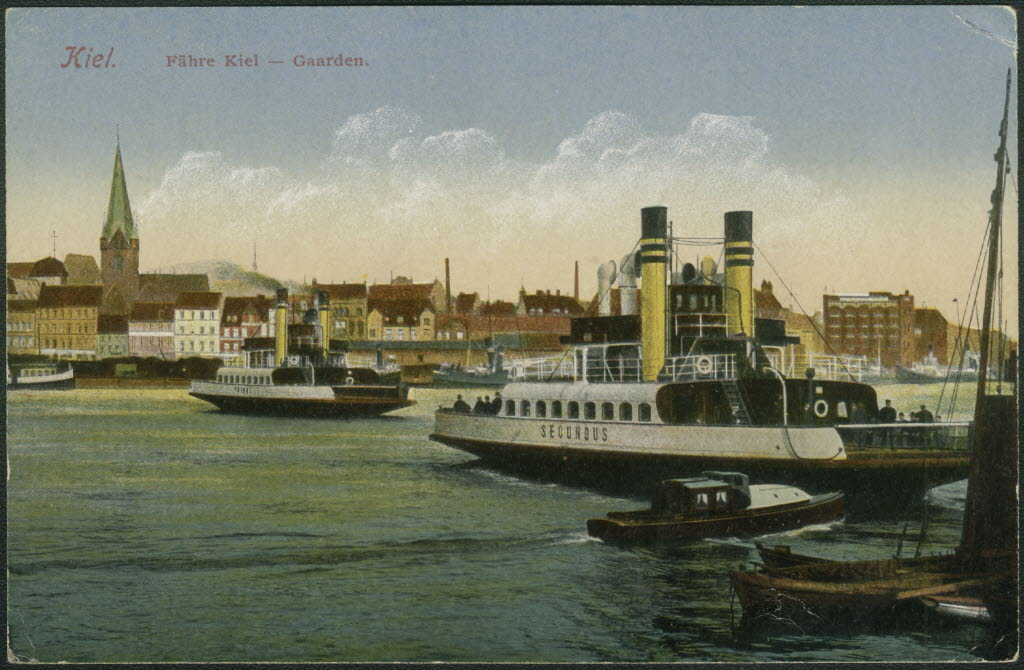 als Personen- und Fahrzeugfähren zwischen dem Bootshafen und dem Fähranleger Gaarden.